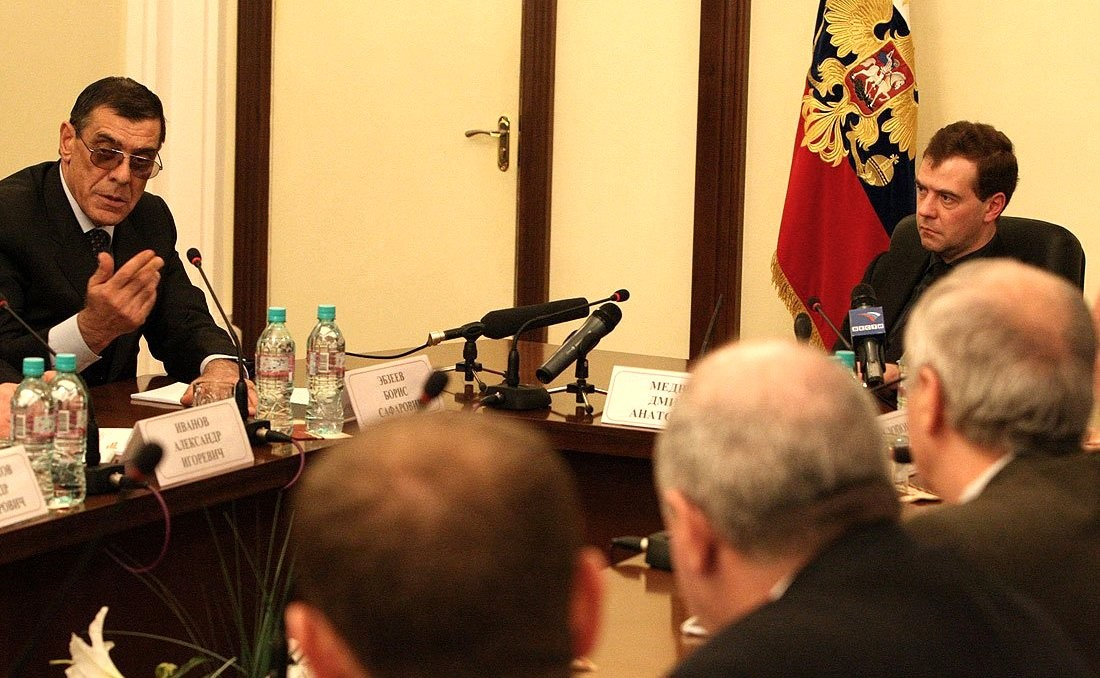 Президент Карачаево-Черкесской Республики Борис Эбзеев на совещании по вопросам социально-экономического развития Карачаево-Черкесской Республики.